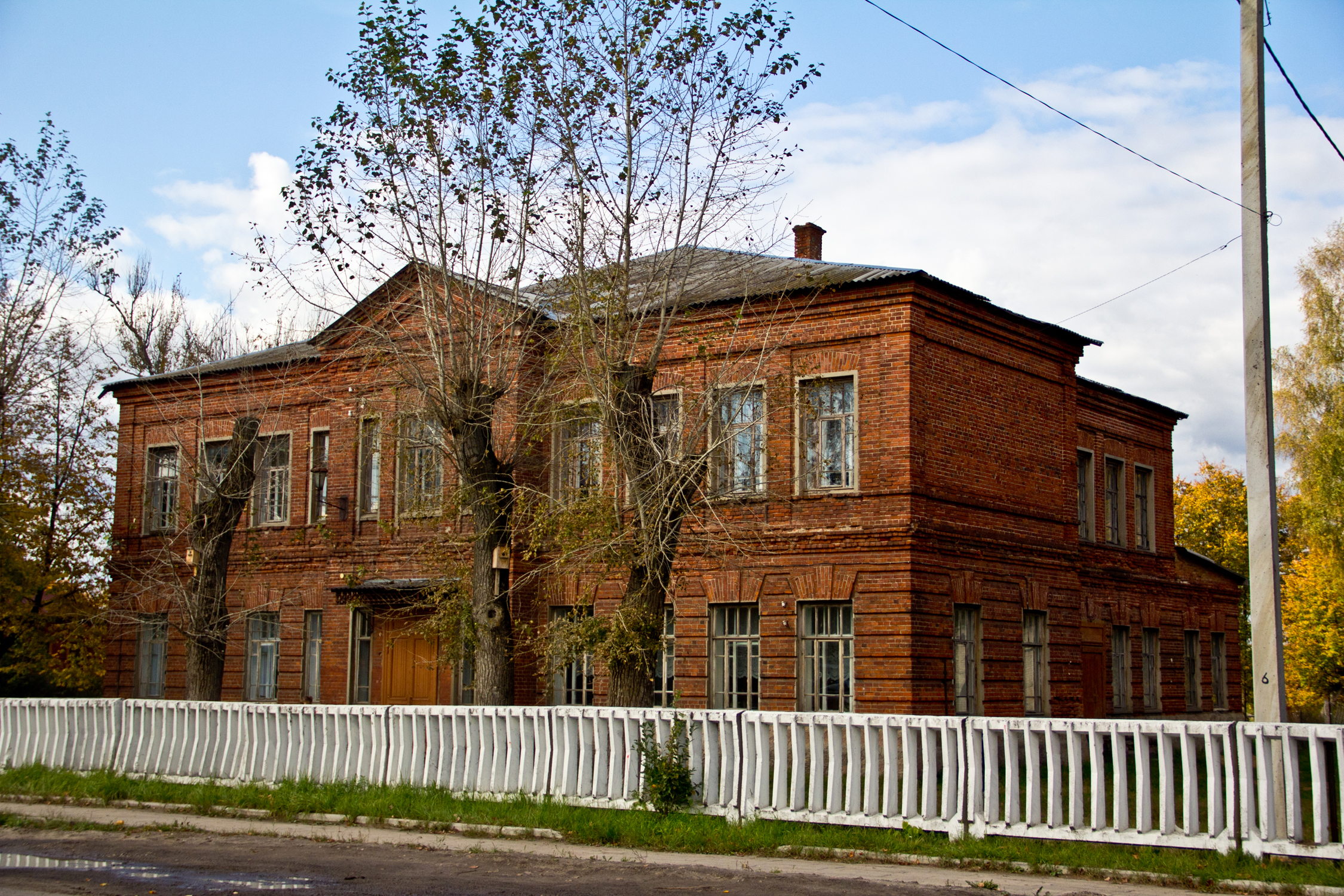 в настоящее время в здании находится начальная школа